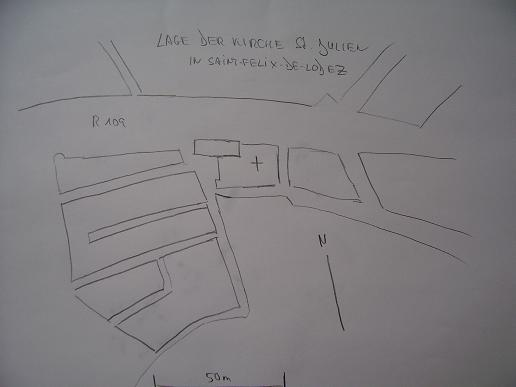 Lager der Kirche im Ort